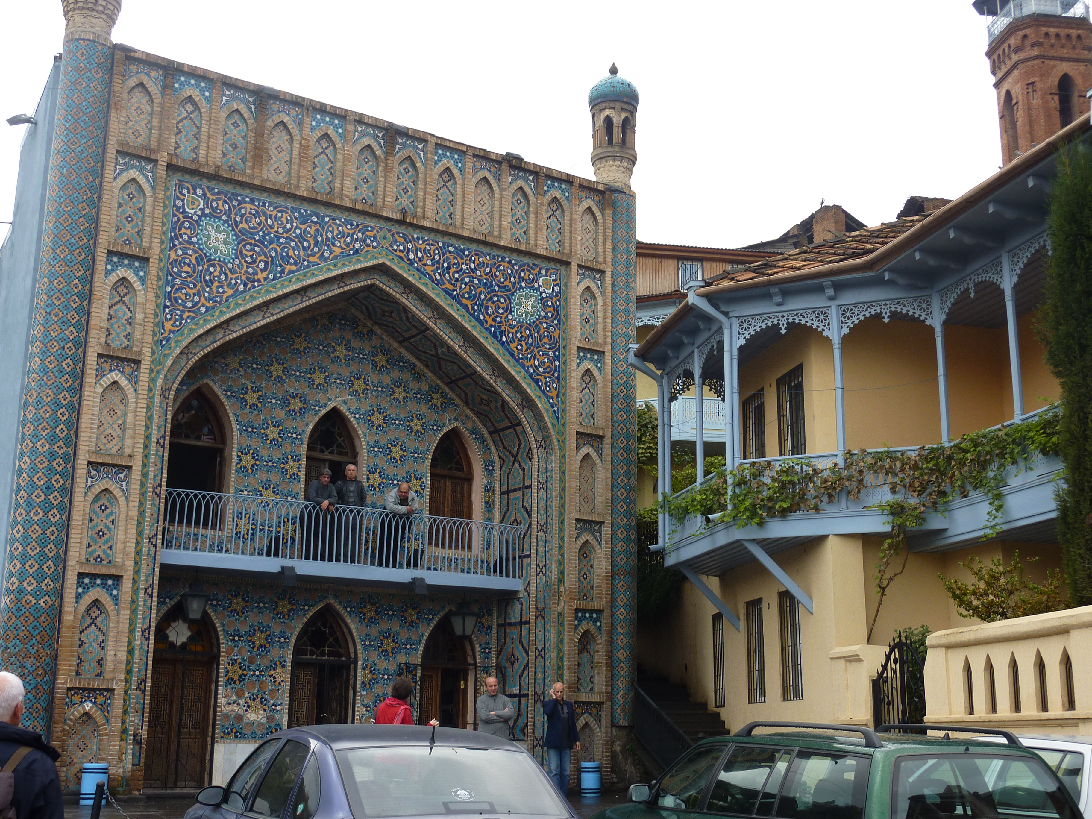 Tbilissi : Bains Orbeliani et maison à balcon de bois voisine